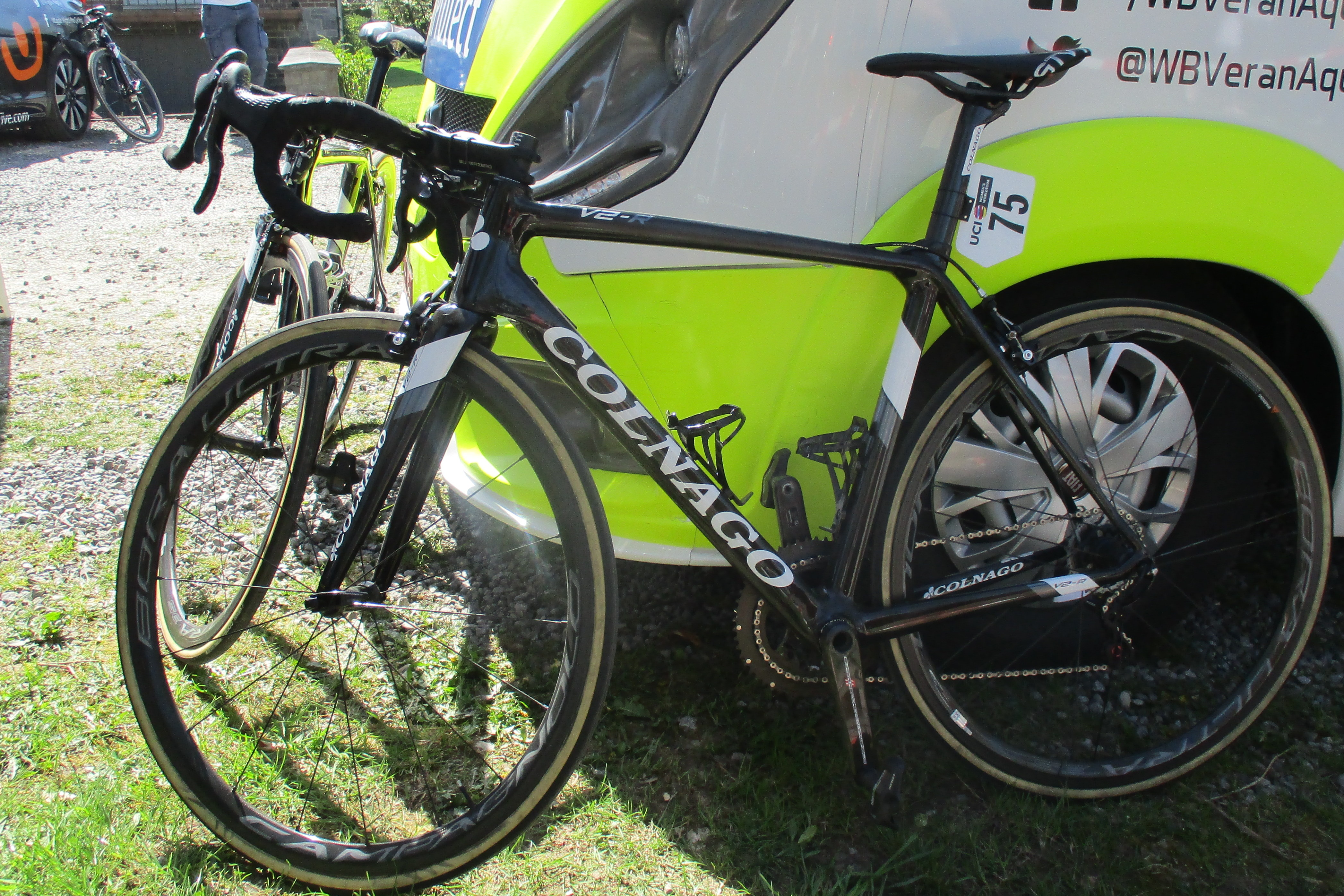 Waalse Pijl 2018 op de Mur van Huy.